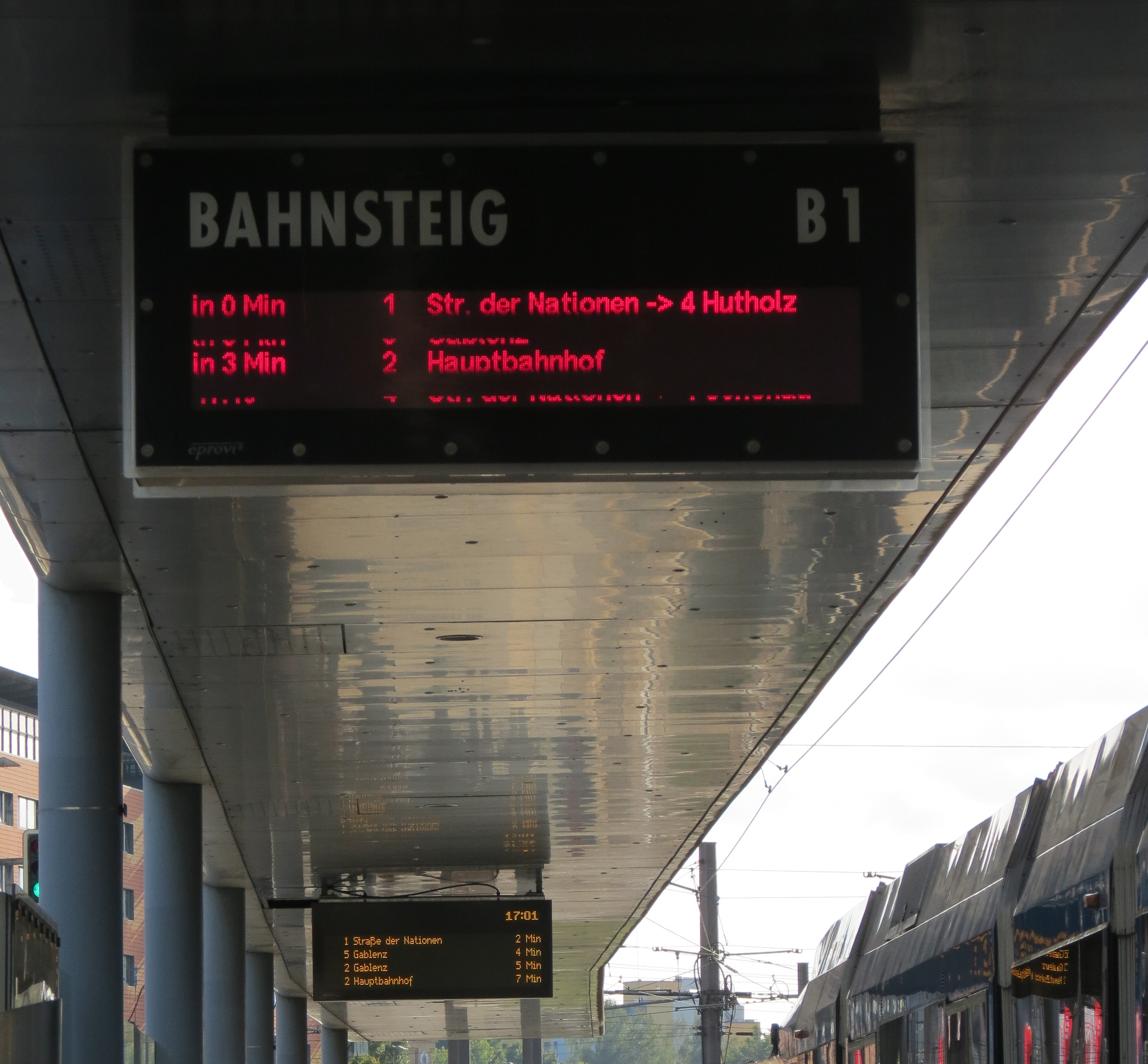 Umbau der dynamischen Anzeigen an der Zentralhaltestelle Chemnitz